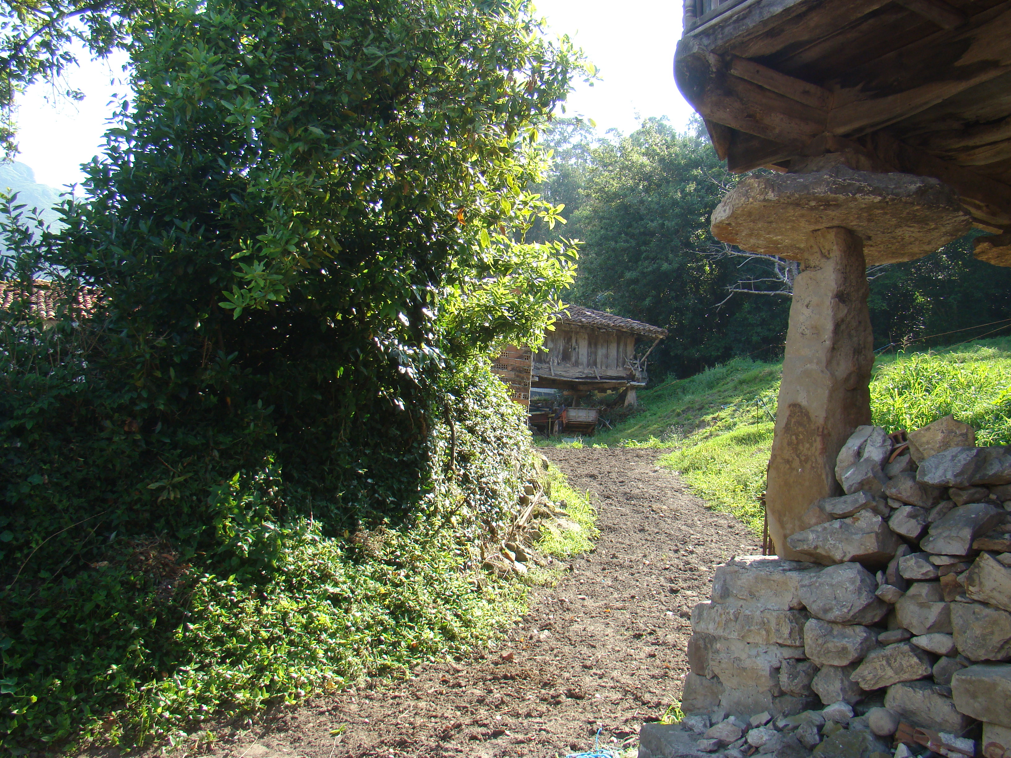 Núcleo de población de Cuevas en la parroquia de Junco, concejo de Ribadesella (Asturias, España). Camino sin asfaltar; al fondo un hórreo.